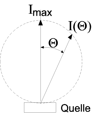 Diagramm des Lambertstrahlers